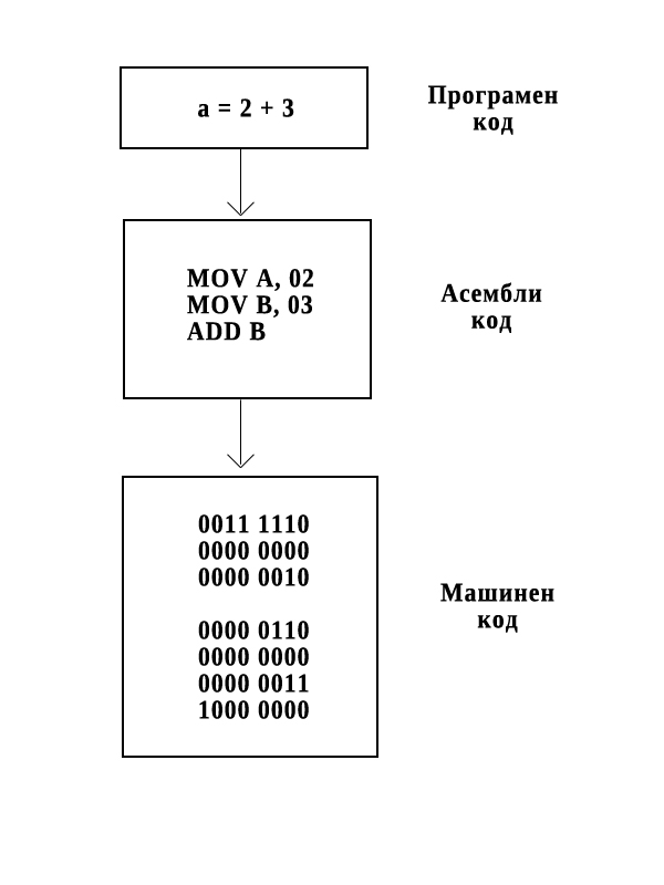 Трансформация на кода